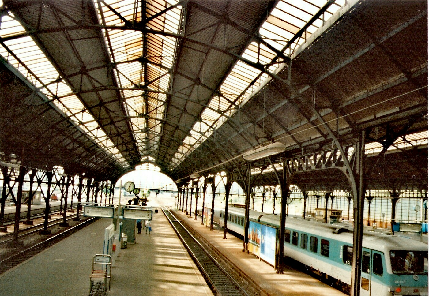 Lübeck Hauptbahnhof, alte Bahnhofshalle 1998 (vor dem Umbau von 2003 ff.)